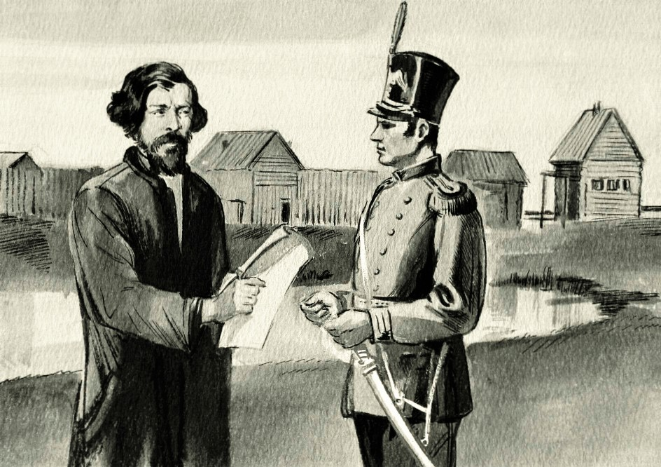 «Rifiuto della grazia», opera di Boris Vasil'evič Milovidov (1902-1975)